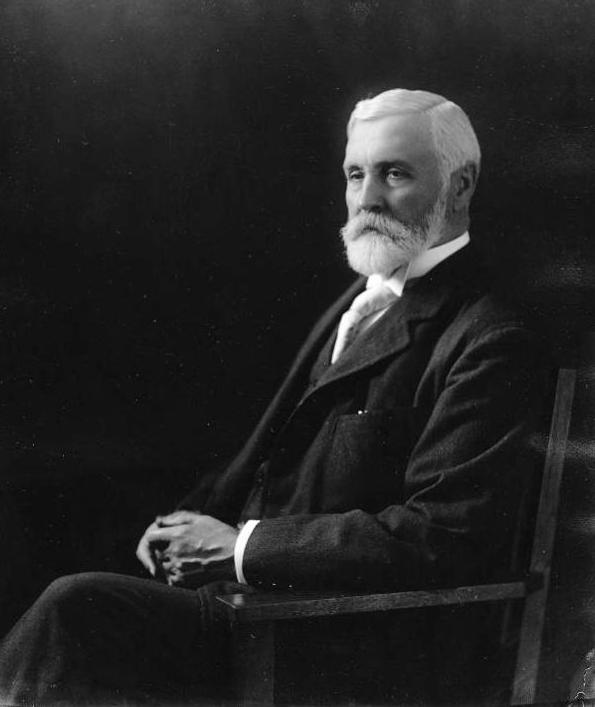 Photographie Richard B. Angus, Montréal, QC, 1906 Wm. Notman & Son 1906, 20e siècle Plaque sèche à la gélatine 25 x 20 cm Achat de l'Associated Screen News Ltd. II-160927